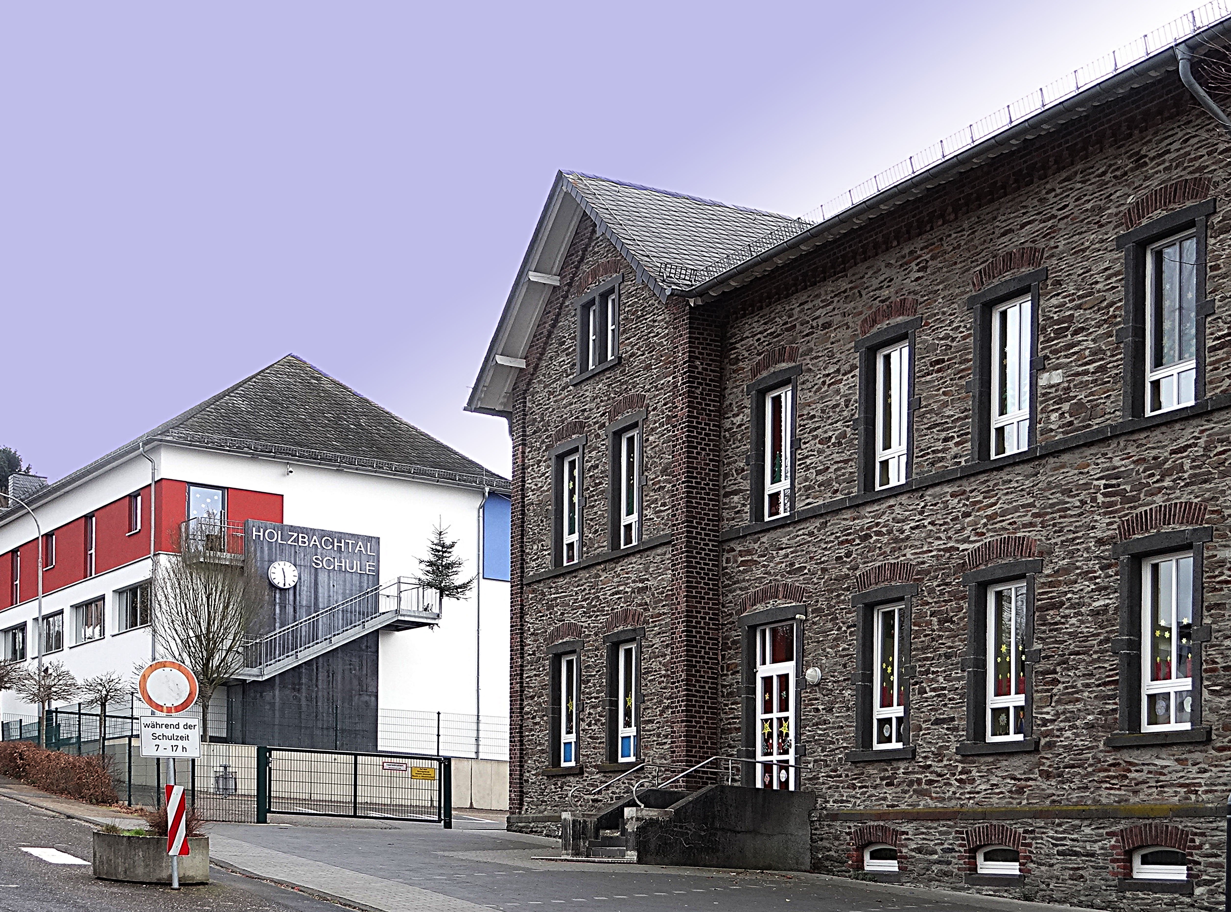 Holzbachschule Puderbach